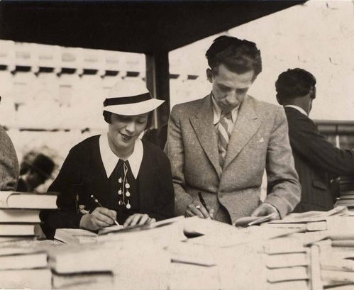 Vaszary Piri és Vaszary Gábor.